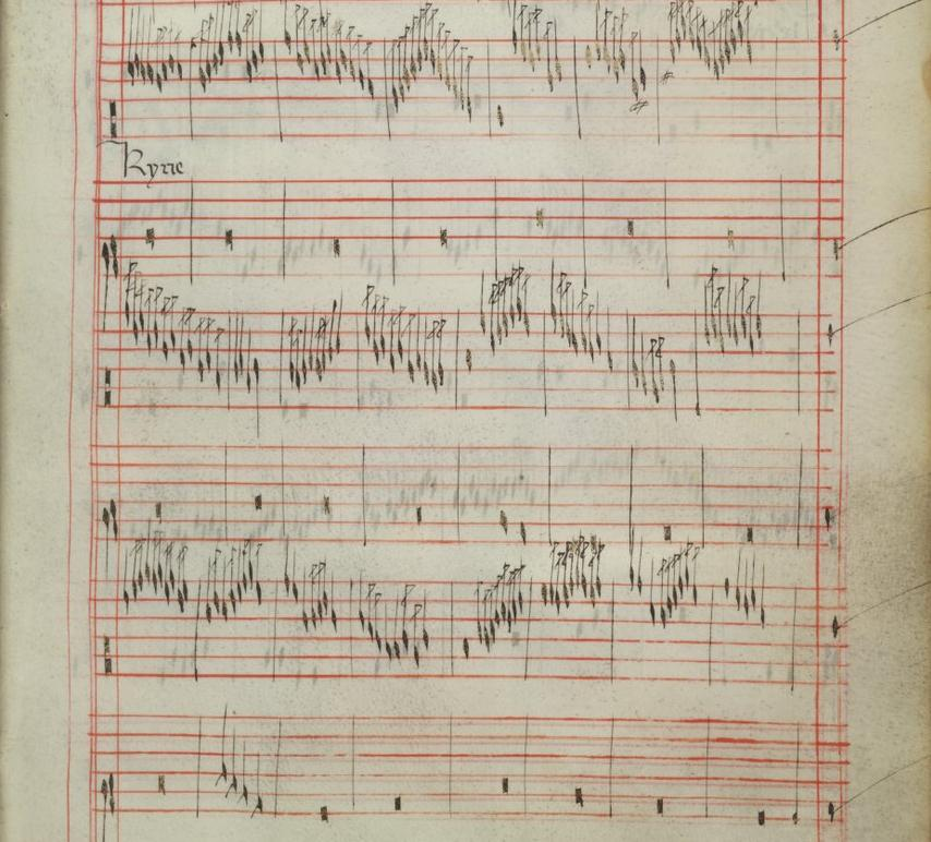 Codex Faenza